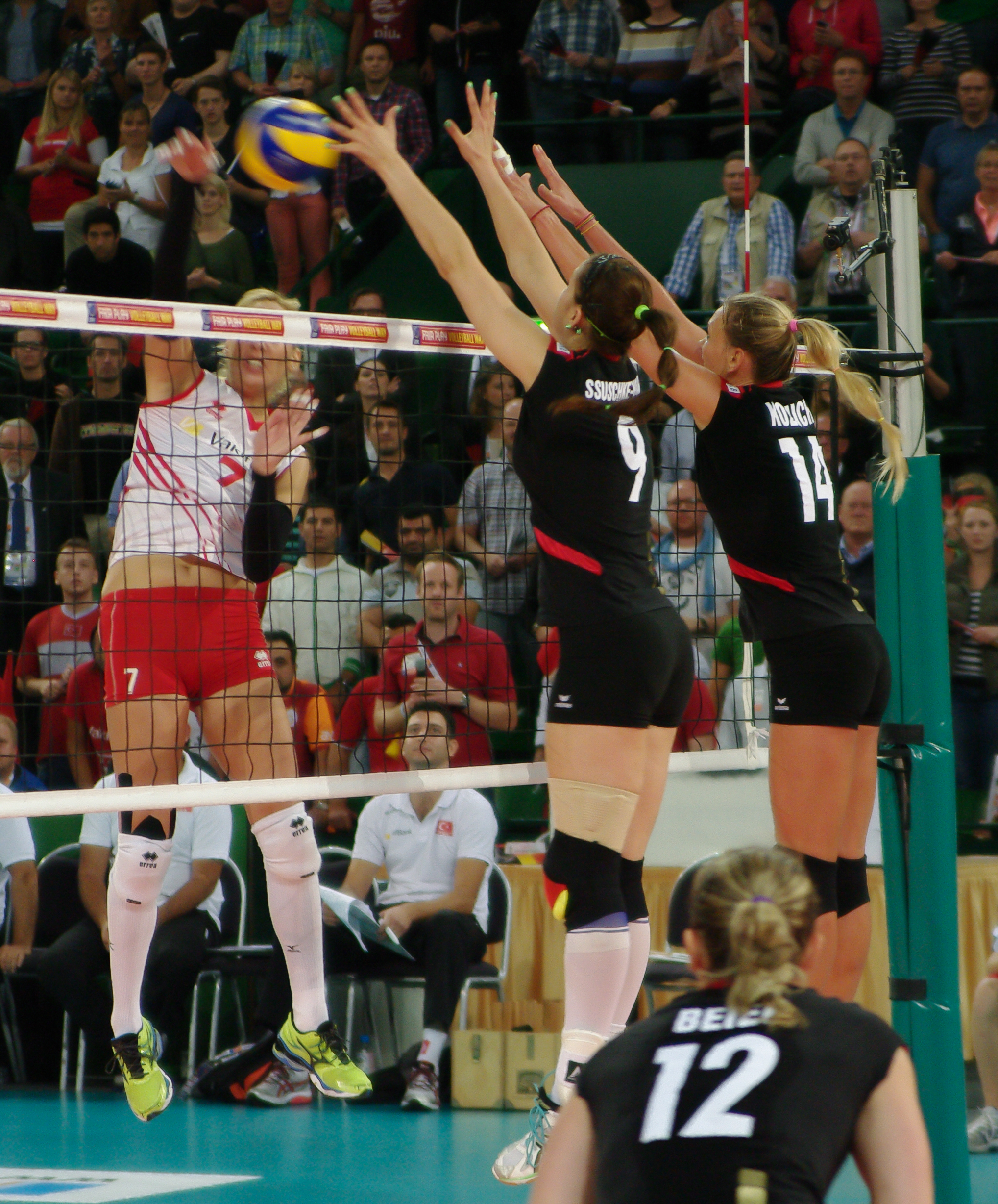 Fotos Moritz Kosinsky aus dem Jahr 2013